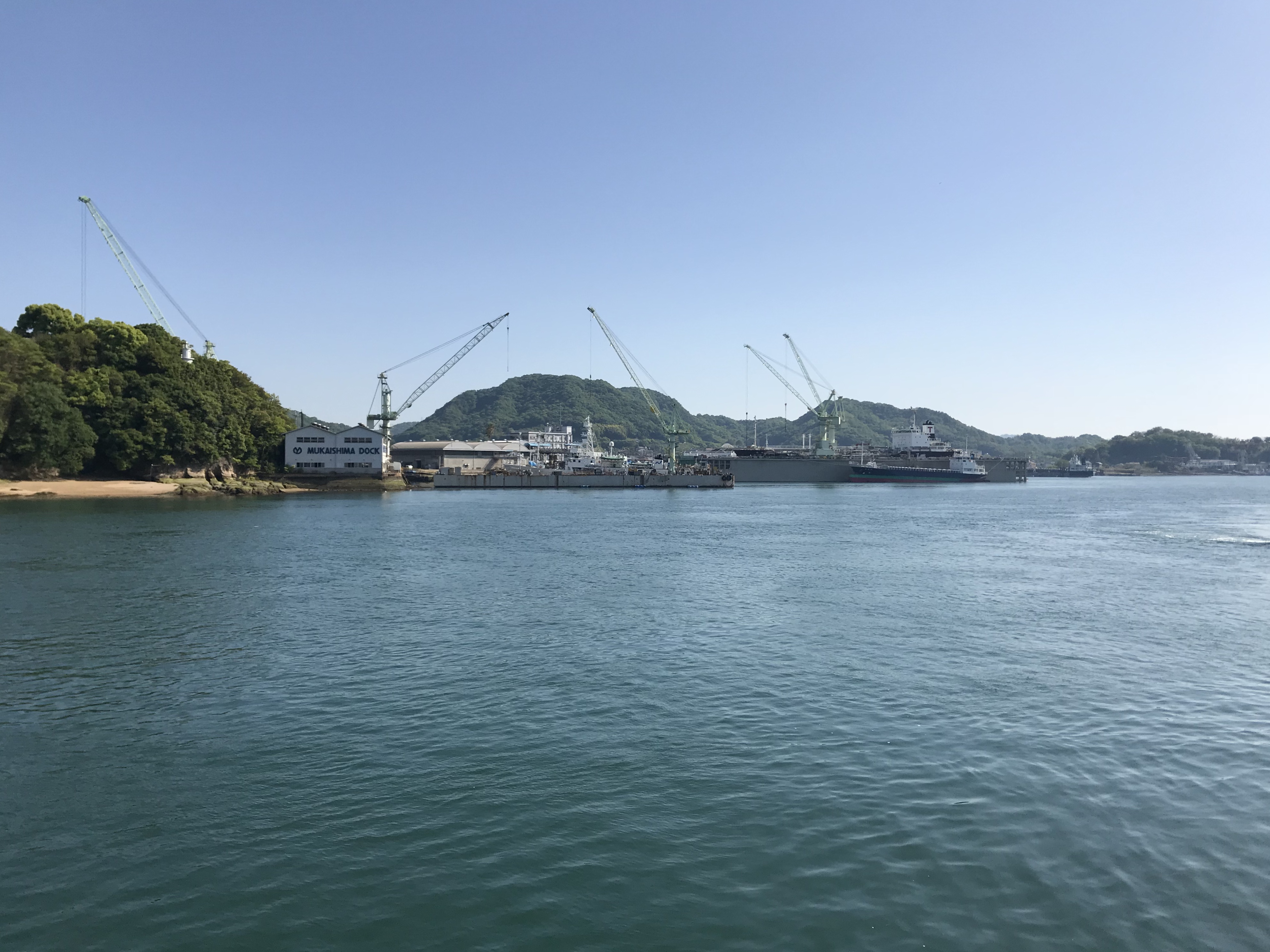 尾道水道を隔てて望む向島ドック